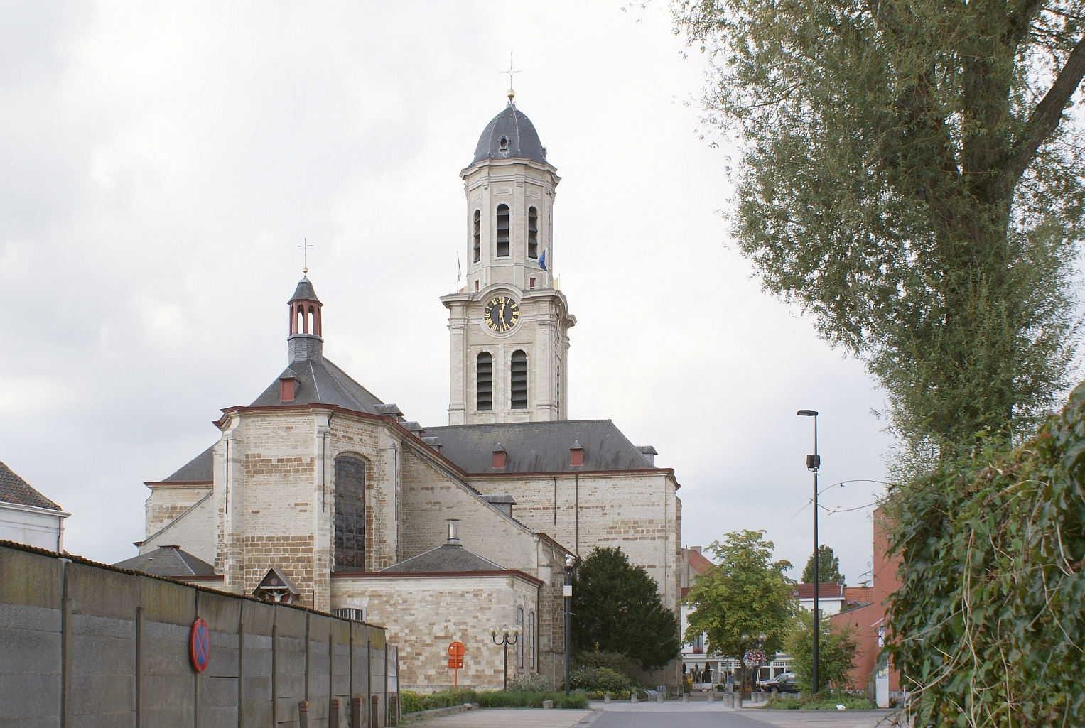 Sint-Laurentiuskerk (Lokeren) - Koor, kruisbeuk en toren